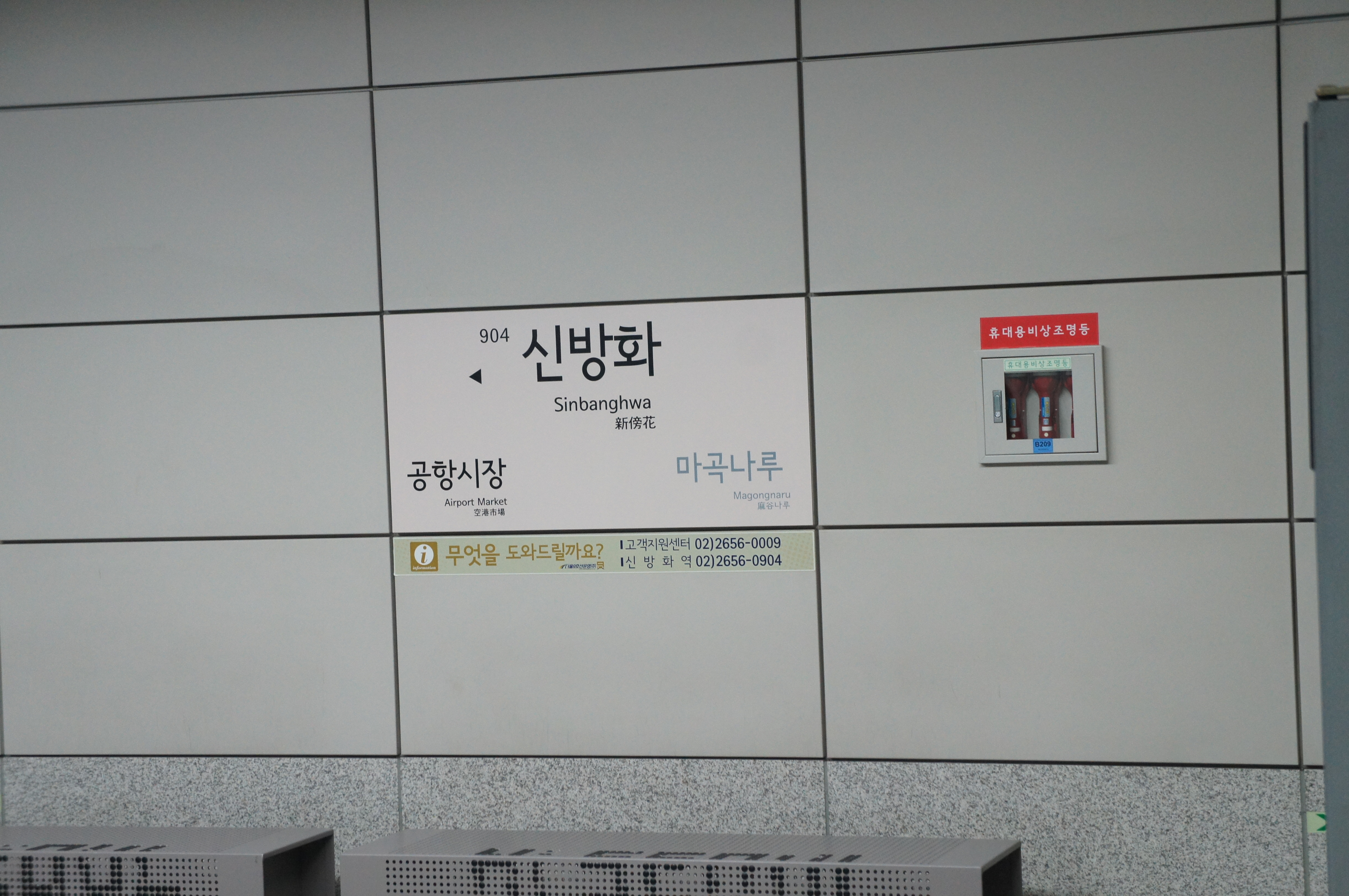 신방화역 역명판